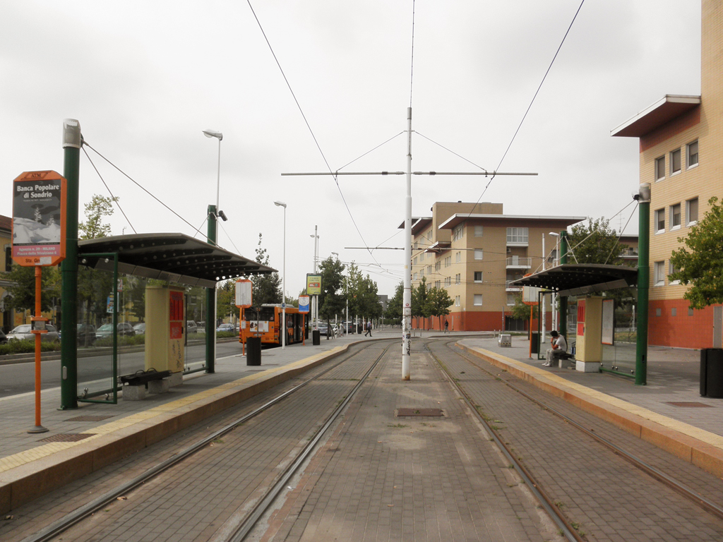 Fermata tranviaria in piazzale Egeo a Milano, a poca distanza dalla stazione Milano Greco Pirelli.